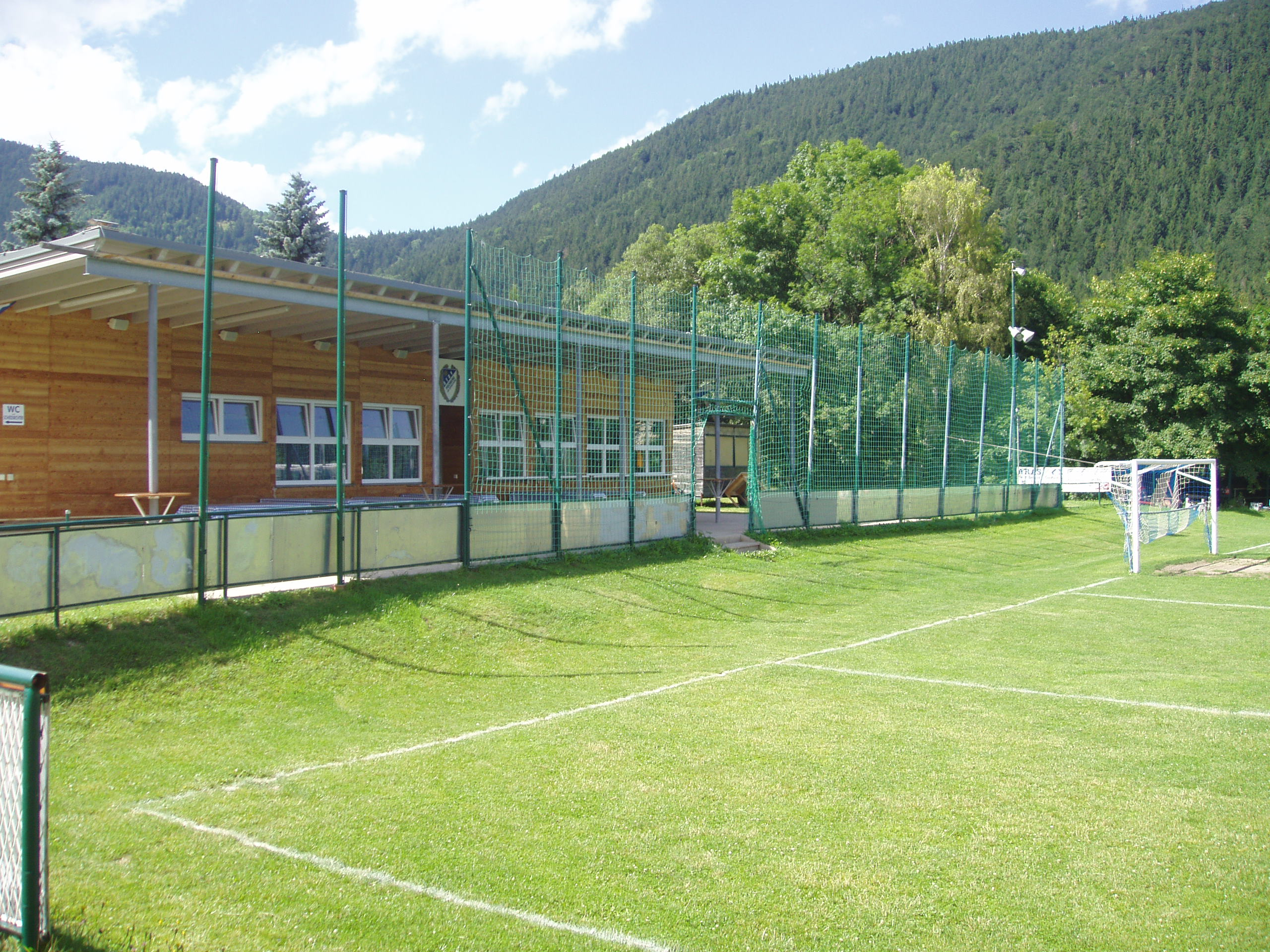 Der Sportplatz des ATSV Puchberg in Puchberg am Schneeberg